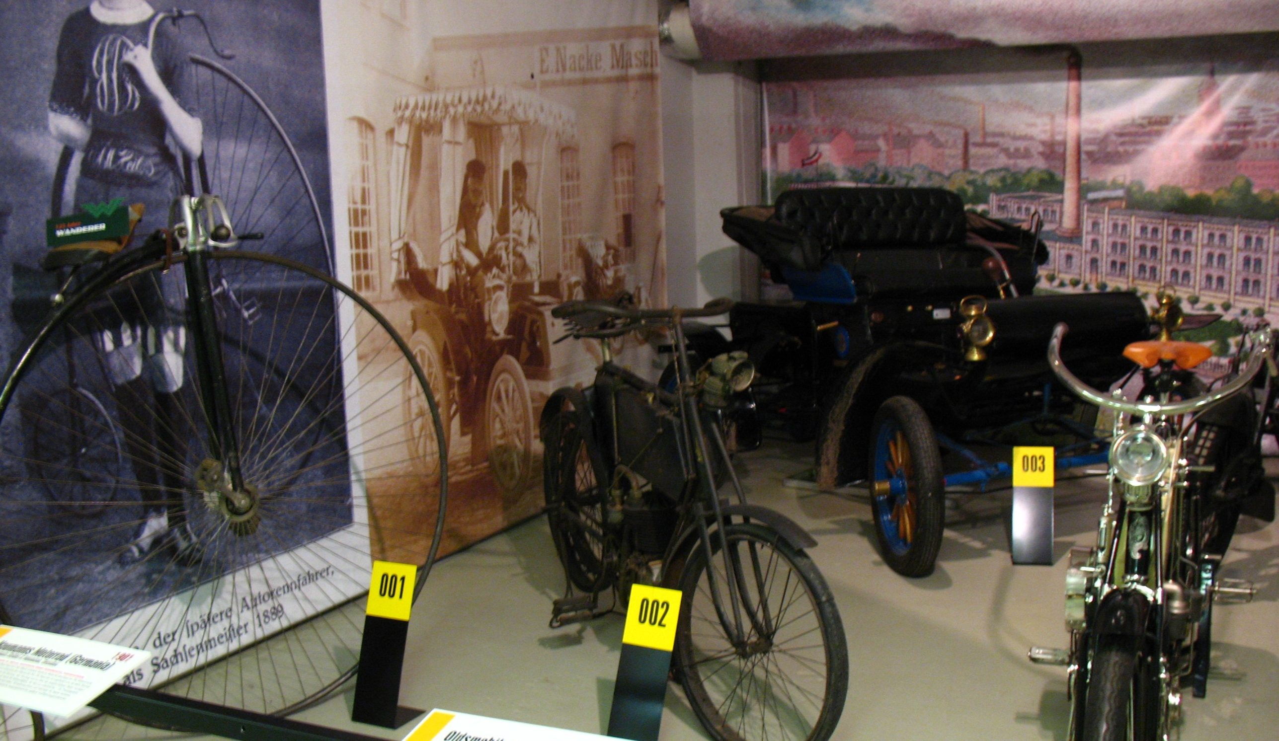 Bereich frühe Motorisierung im Museum für sächsische Fahrzeuge